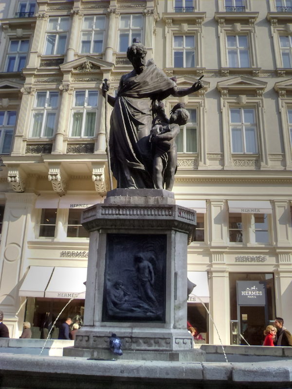 Josefsbrunnen Wien